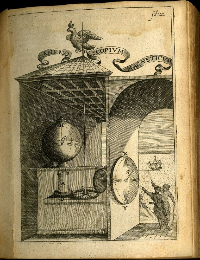 Магнетические часы Афанасия Кирхера